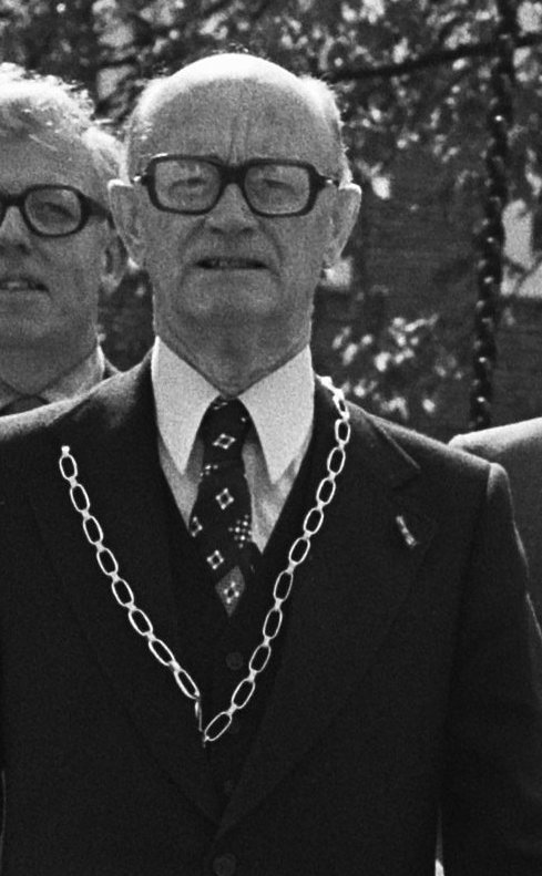 Prins Claus tijdens een wandeling door Weesp met burgemeester Kooiman